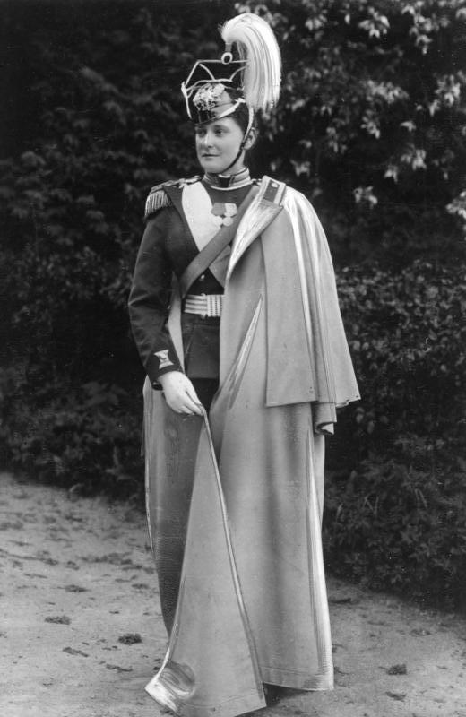 Zarin Alexandra Fjodorowna Scherl Bilderdienst Die junge Zarin Alexandra Feodorowna in der Uniform ihres Ulanenregiments. Abgebildete Personen: Alexandra Fjodorowna: 1872-1918, geboren als Alice von Hessen-Darmstadt, Ehefrau von Zar Nikolaus II., Russland, Zarin, Rußland